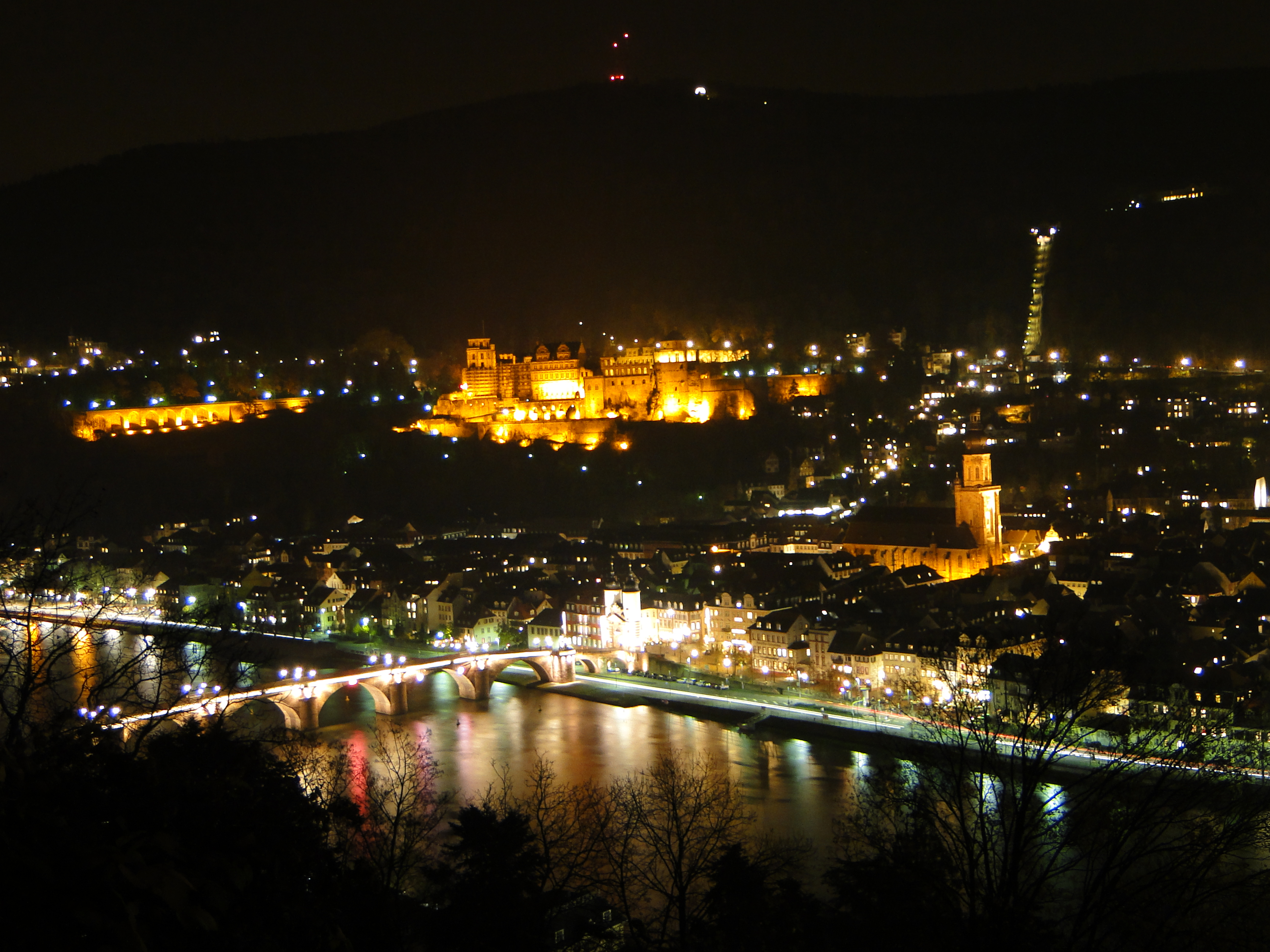 Heidelberg 17.11.2012